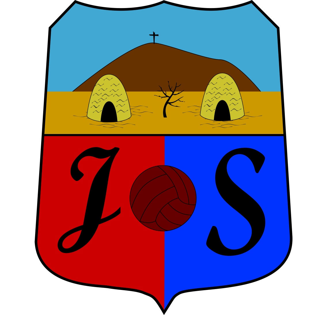 Escudo del Club Deportivo Juventud Silense del municipio de Los Silos, Tenerife, España